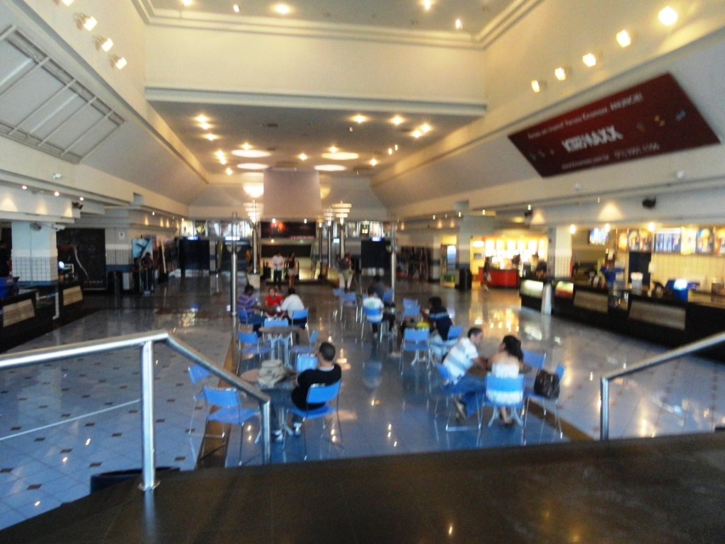 Vista do foyer doUCI Orient do Shopping da Bahia